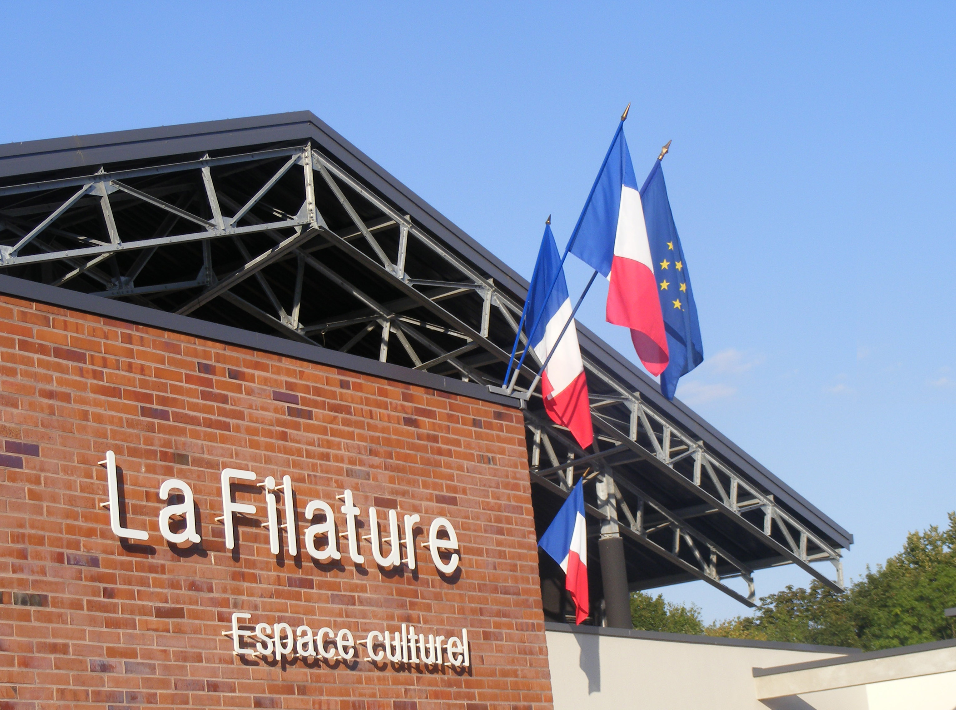 Facade de l'espace culturel la Filature à Bazancourt